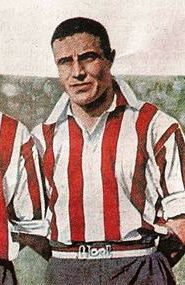 Enrique Guaita en Estudiantes de La Plata (Imagen recortada de Los Profesores).